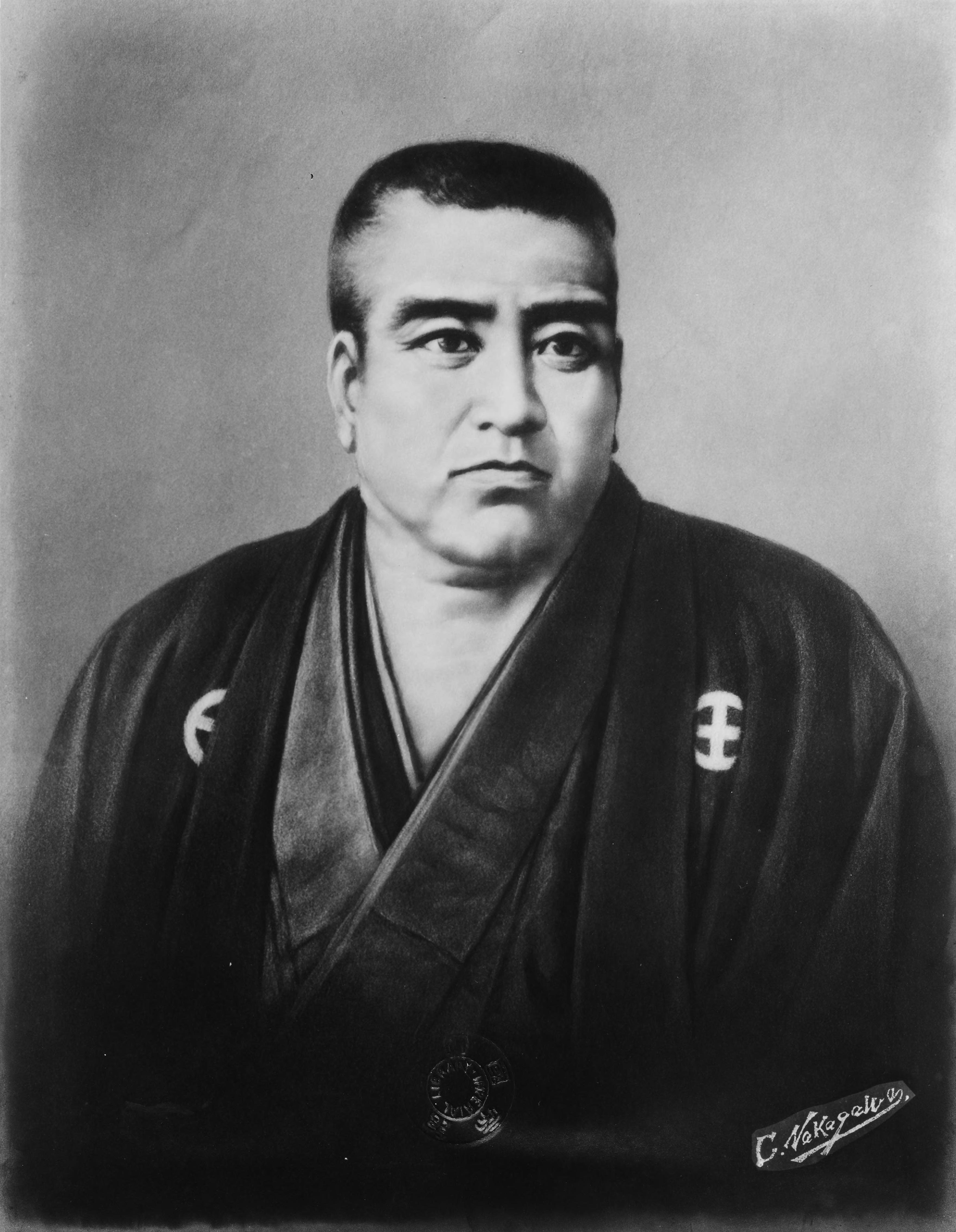 Portrait of Saigo Takamori (西郷隆盛, 1828 – 1877)